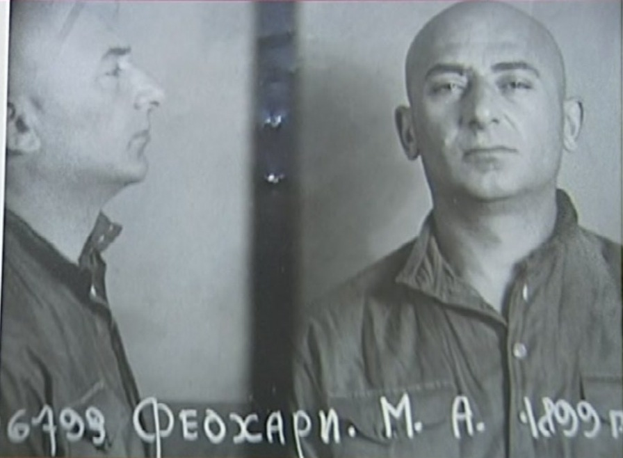 Феохарі Марк Олександрович, фото під час арешту в Москві 2 вересня 1938